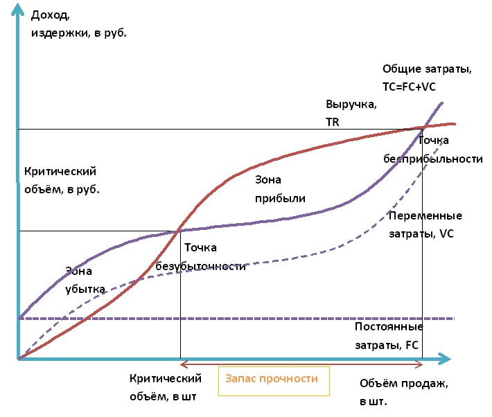 Точка безубыточности (нелинейные функции). точка бесприбыльности